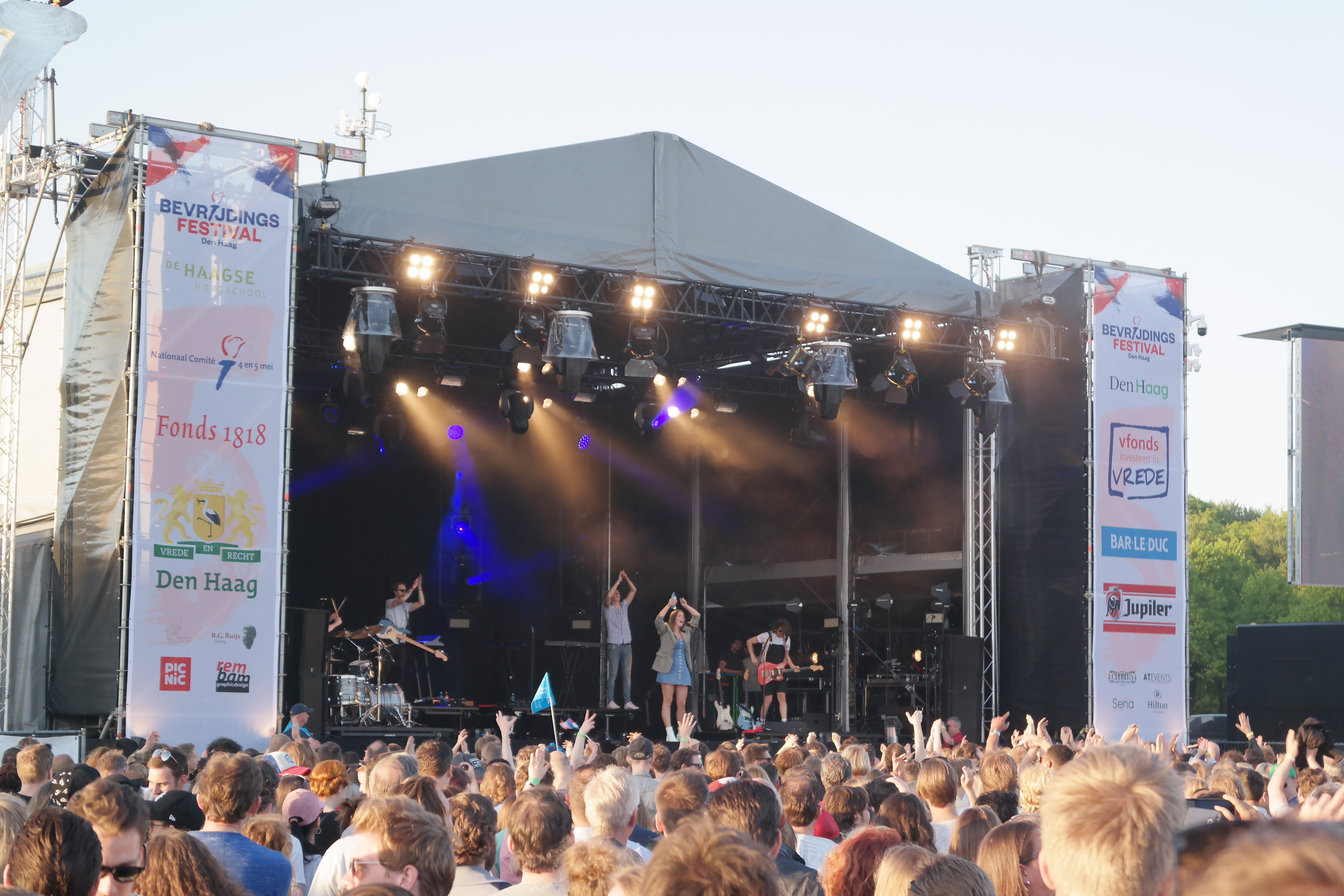 De muziekgroep Rondé op het Haagse Bevrijdingsfestival op het Malieveld.